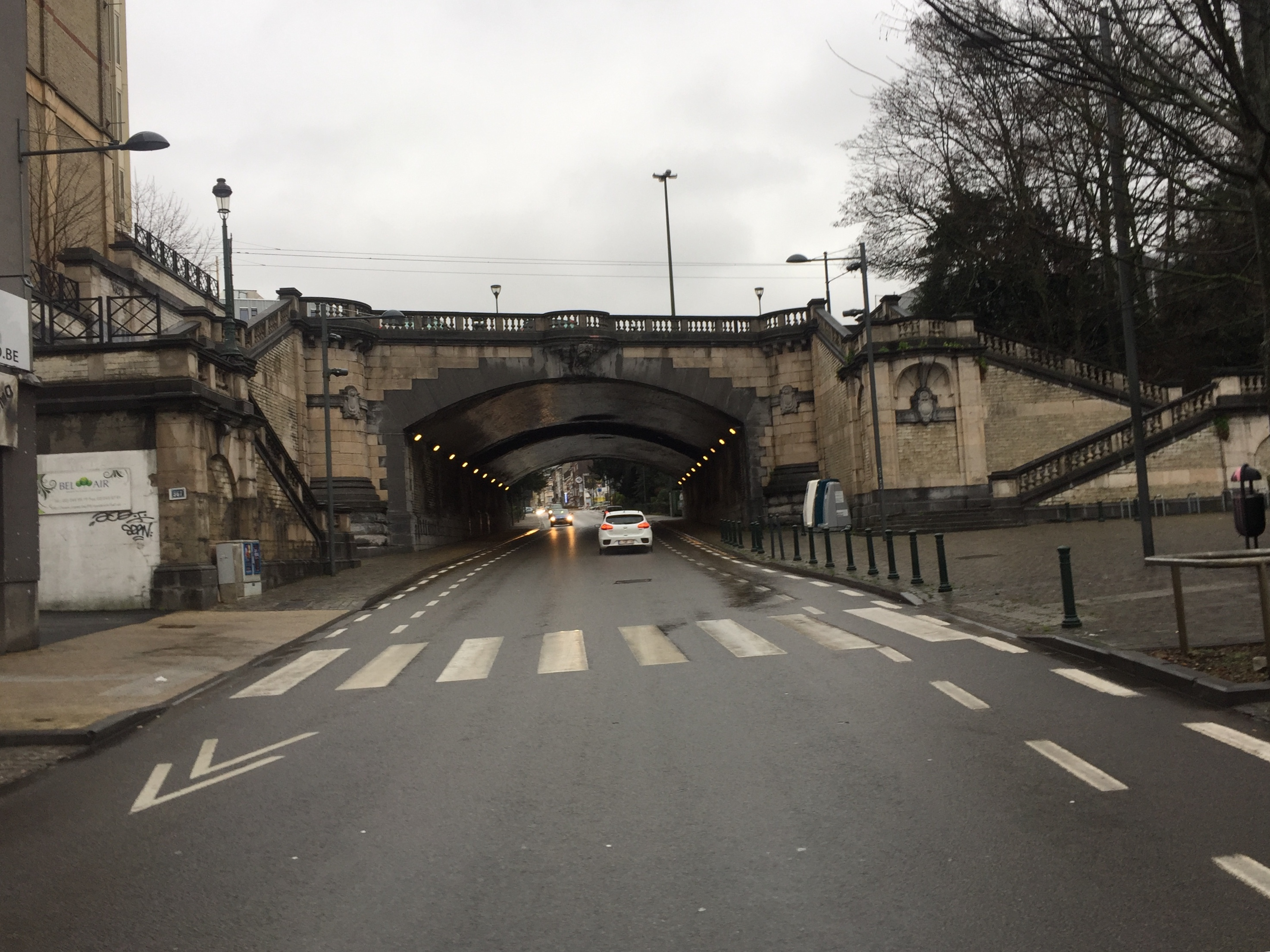 G